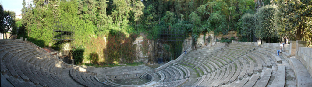 Vista panoràmica del Teatre Grec de Barcelona, a la muntanya de Montjuïc.